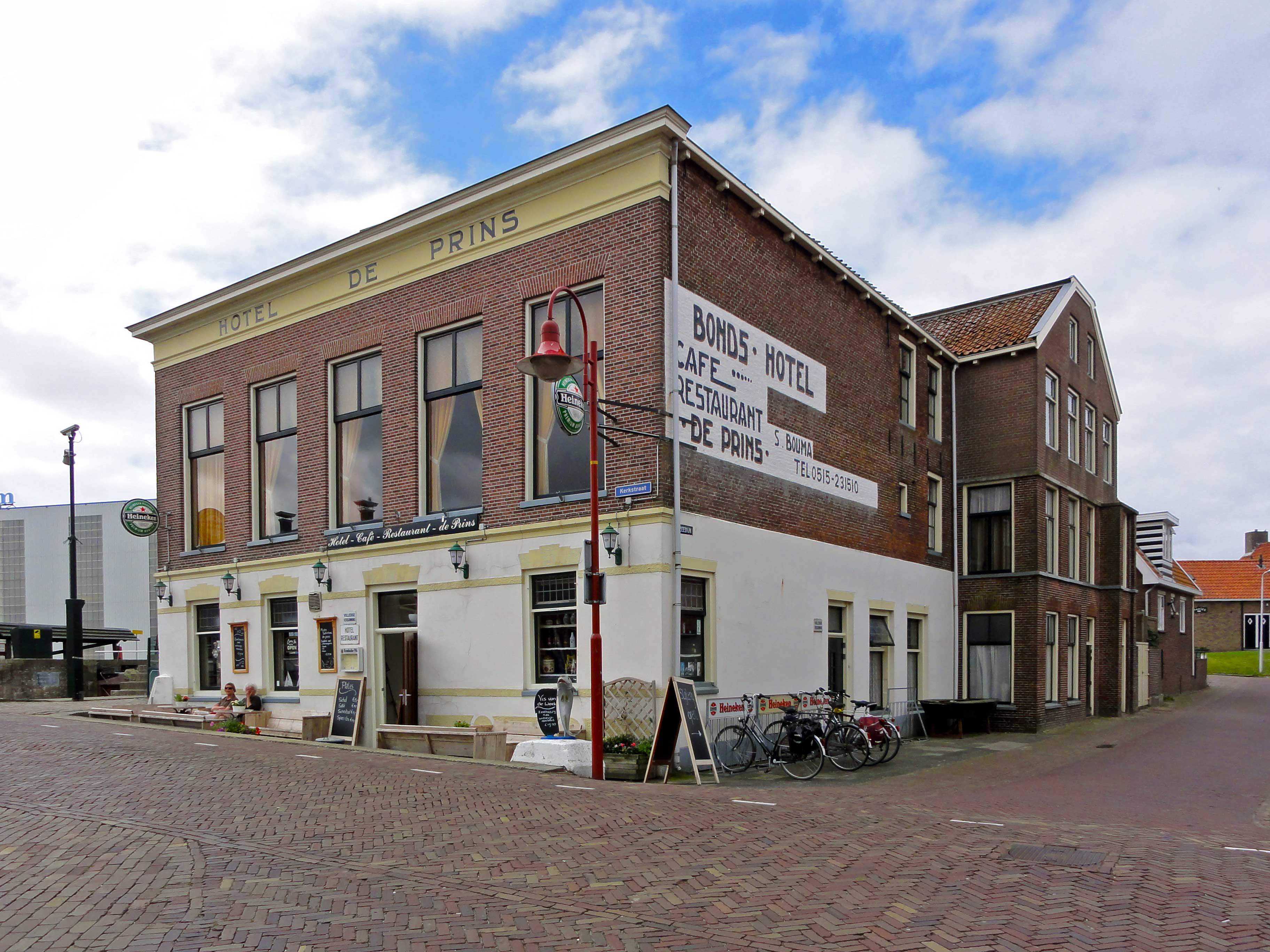 Hotel "De Prins", Kerkstraat 1 te Makkum